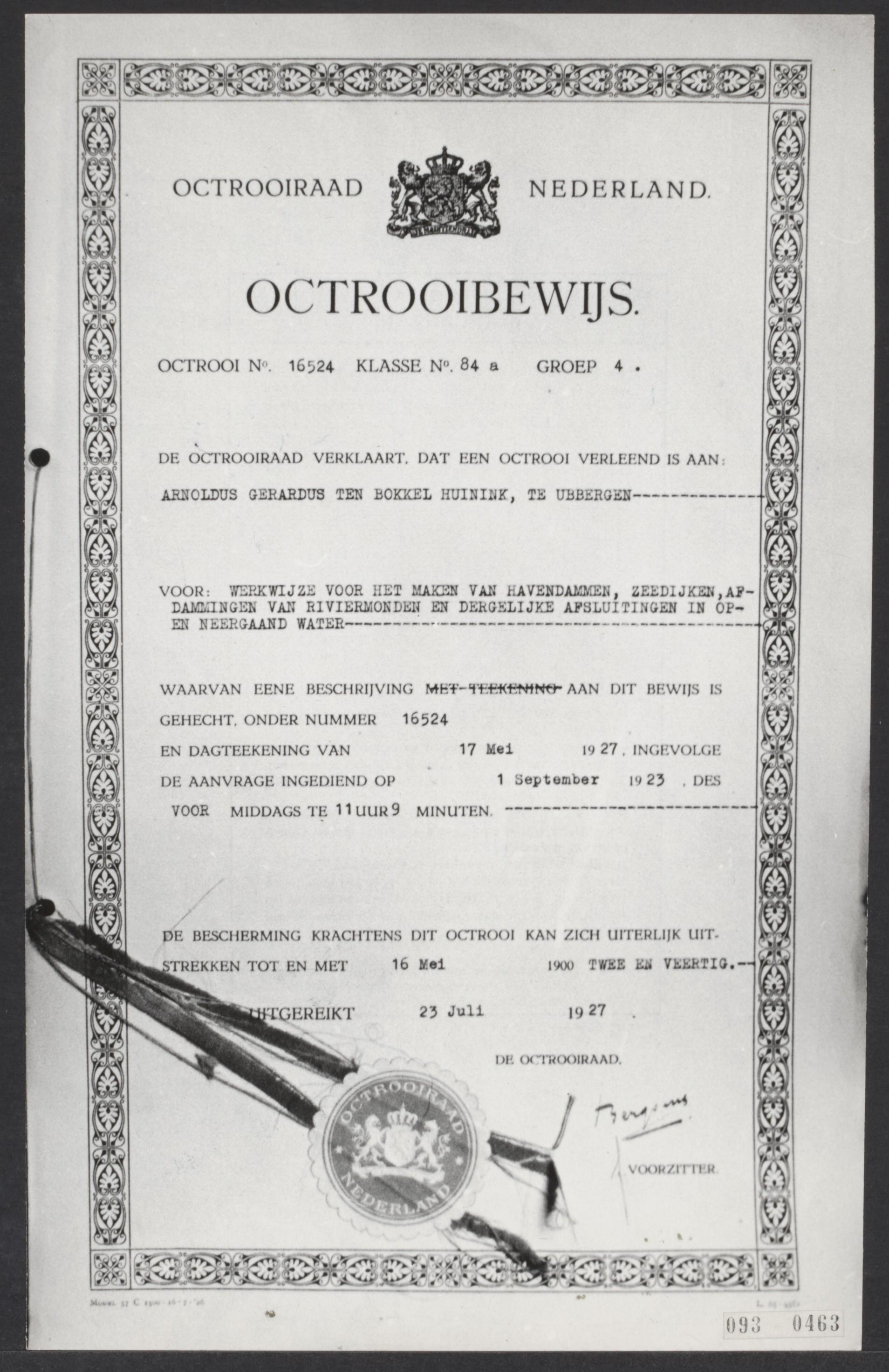 Nederlands octrooi 16524 over caissontechniek, in 1923 verleend aan A.G. ten Bokkel Huinink. Deze techniek werd later bij de Deltawerken toegepast.